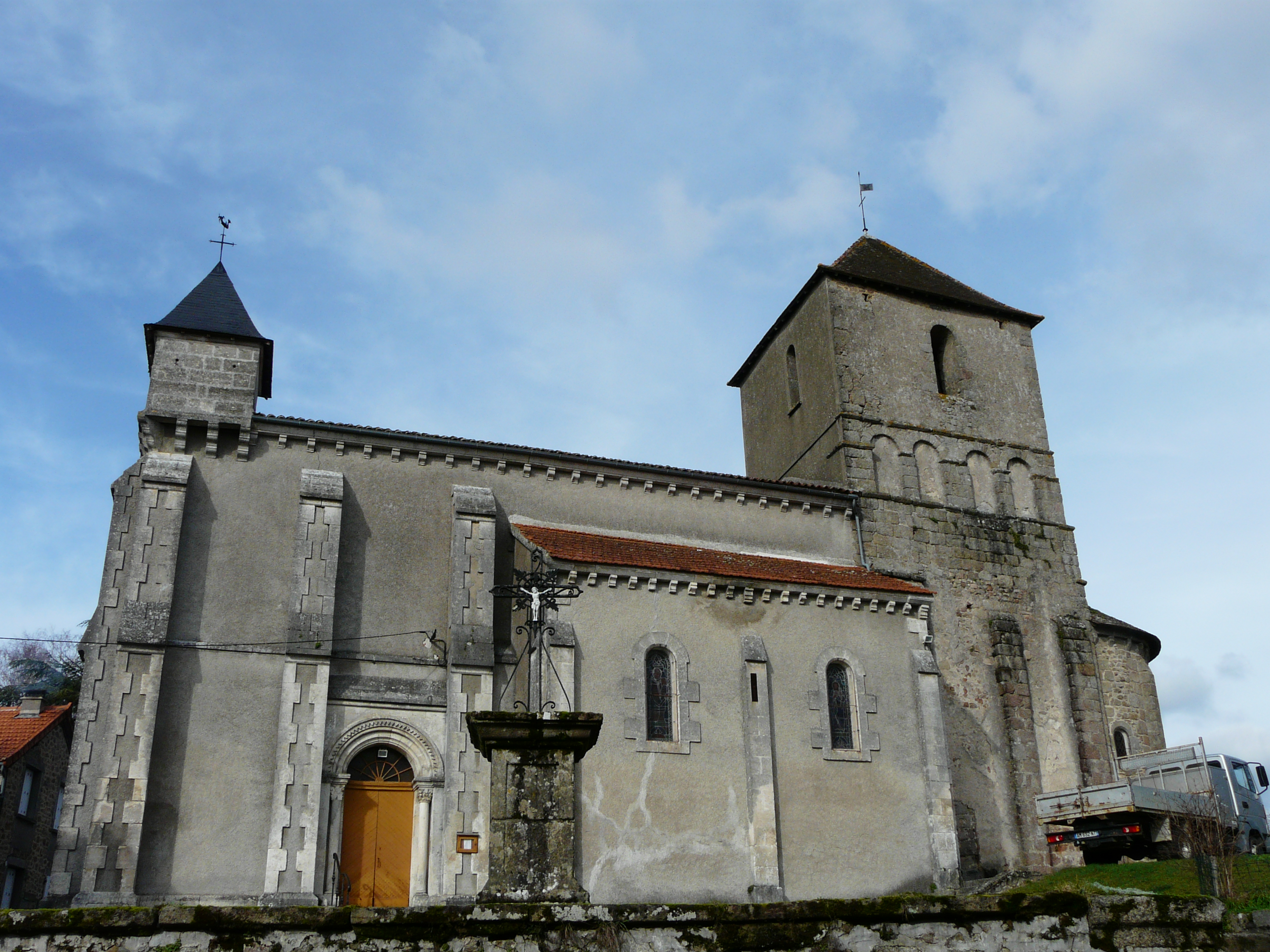 L'église Saint-Martial d'Augignac, Dordogne, France.